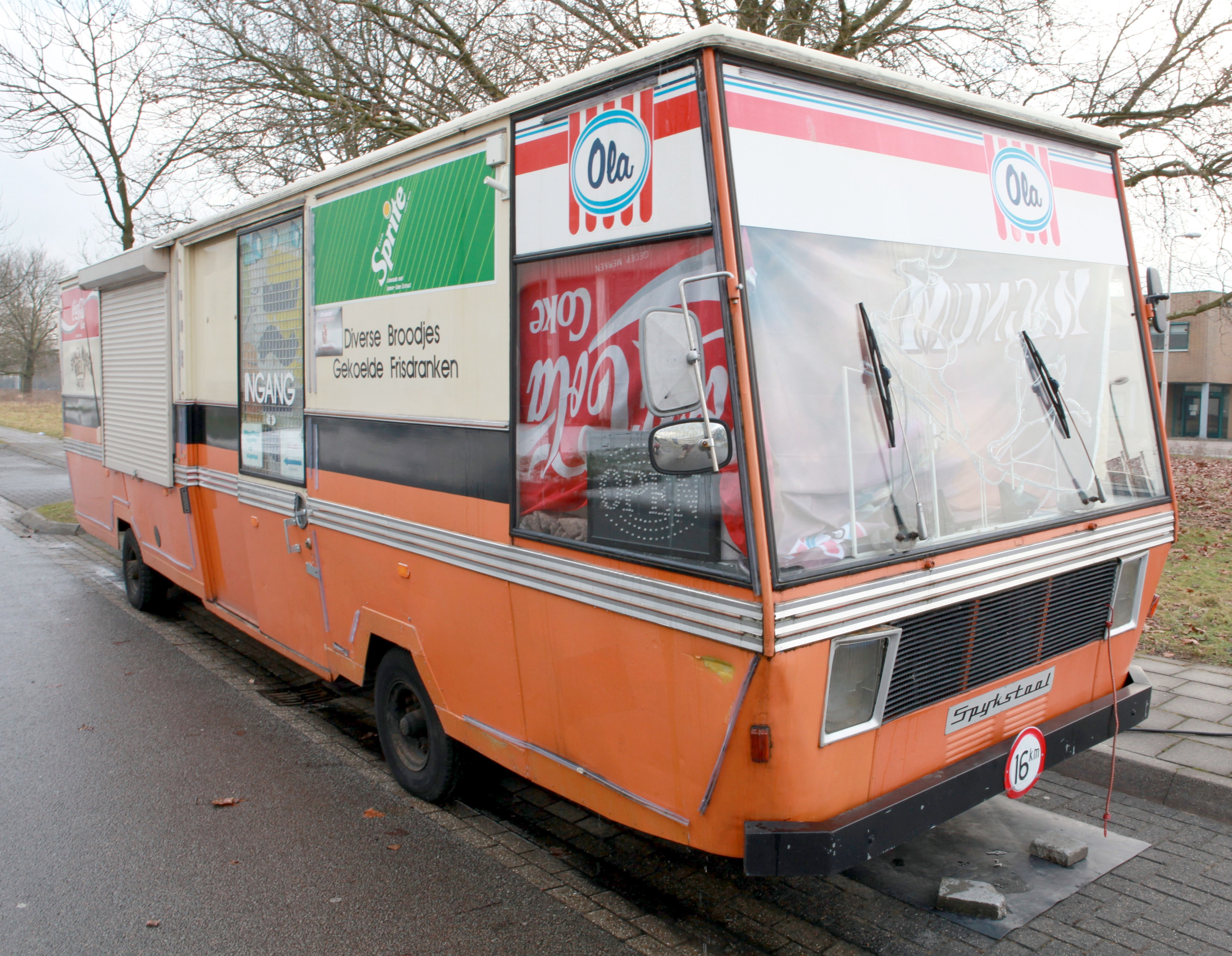 Spijkstaal